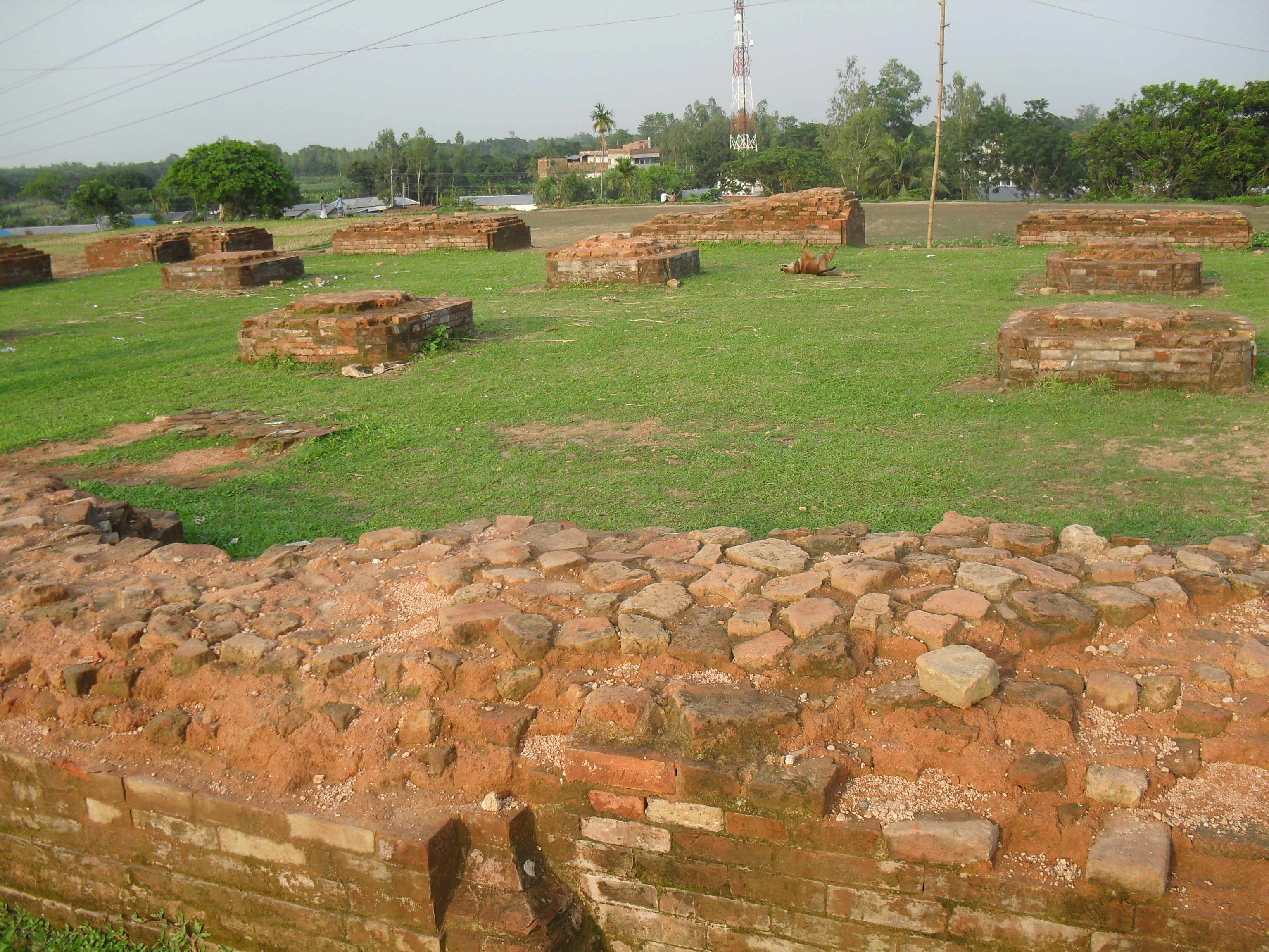 মানকালীর ঢিবি